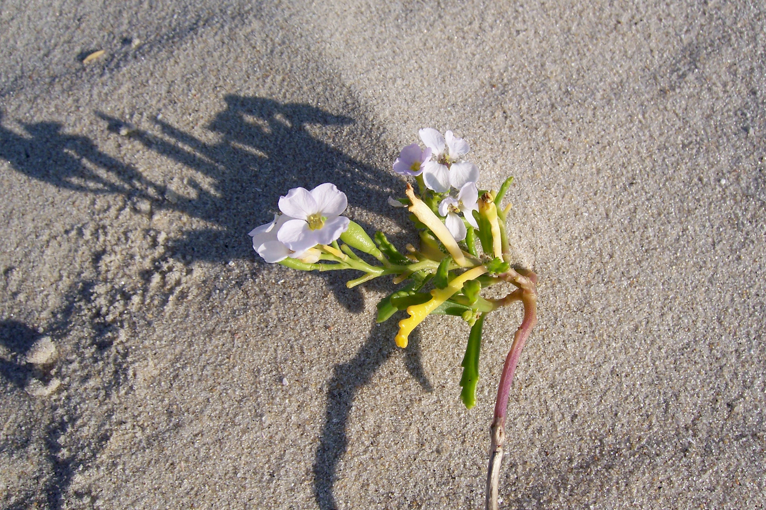 Nordseeinsel Spiekeroog: Europäischer Meersenf (Cakile maritima)